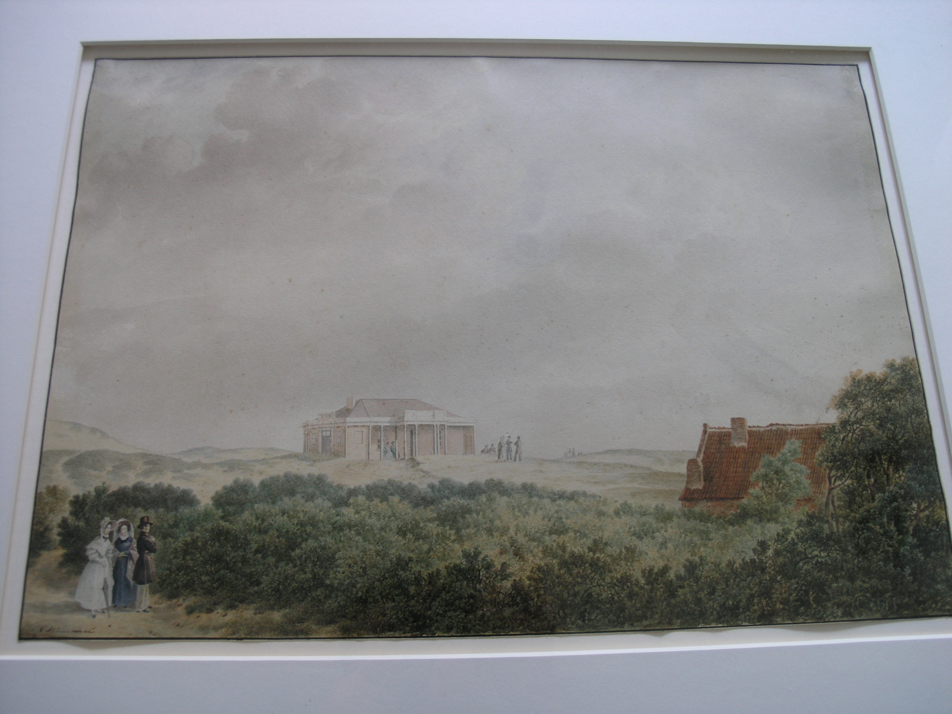 Badpaviljoen te Domburg